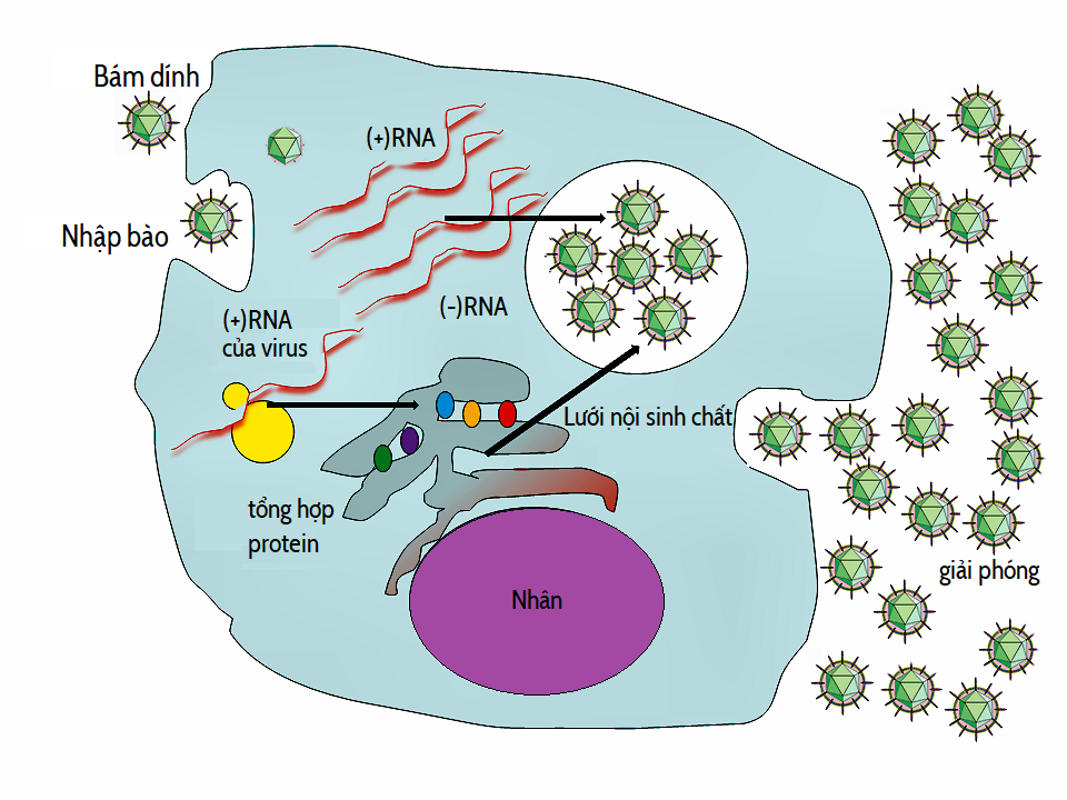 Sơ đồ đơn giản chu trình virus viêm gan C